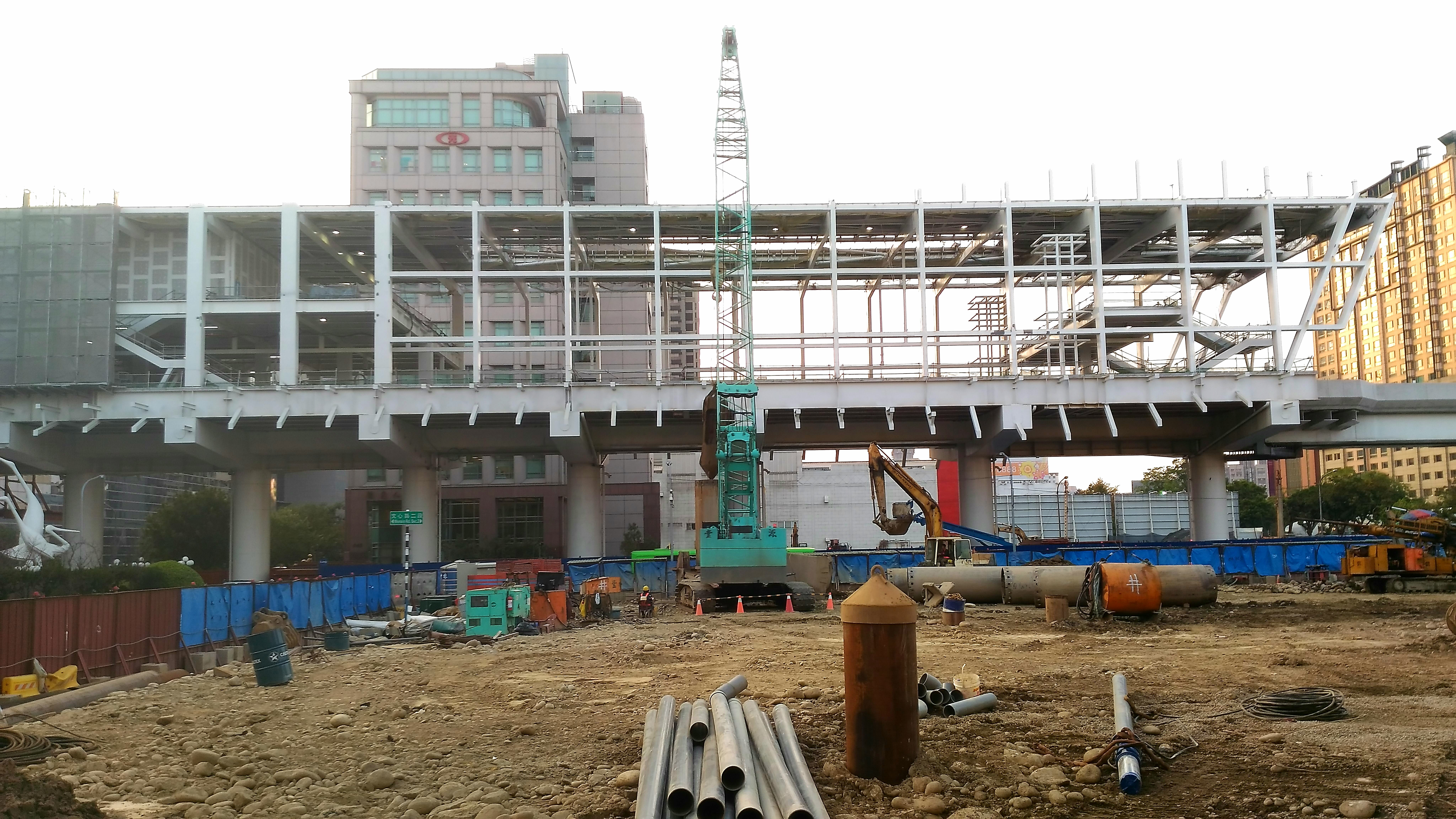 臺中捷運市政府站與聯合開發大樓，2017年2月工程情況